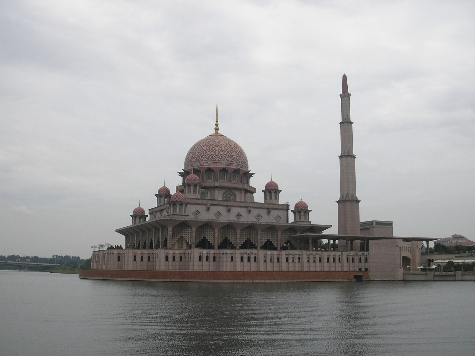 The Masjid Putra in Putrajaya.